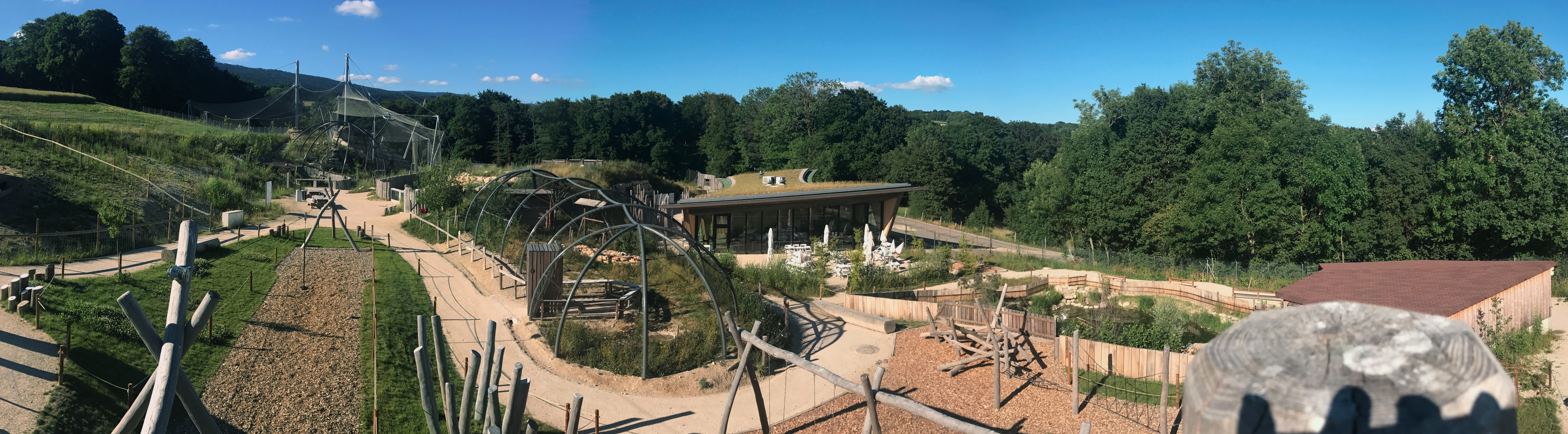 photo